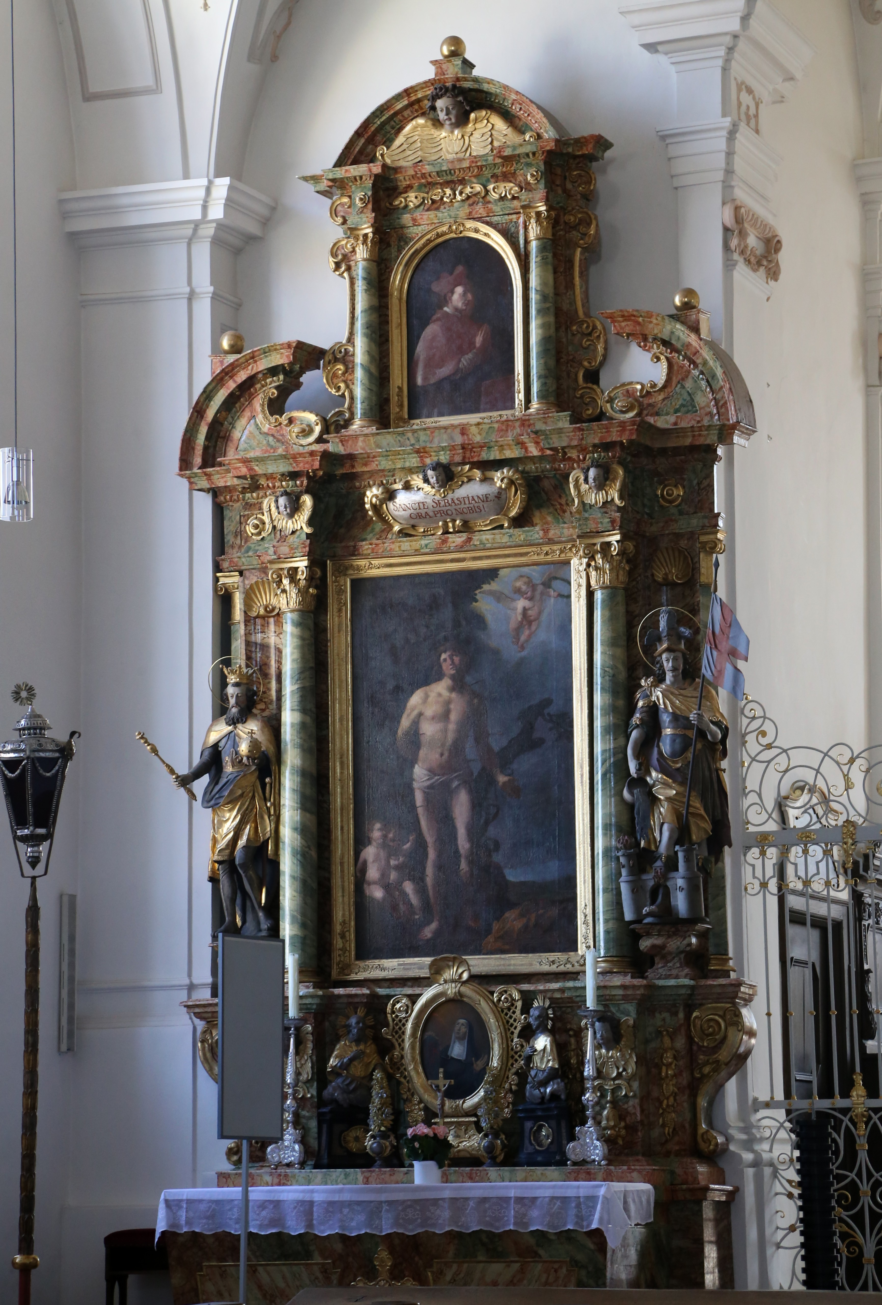 Maxlrainer Straße 11, Beyharting, Tuntenhausen; Ehemalige Augustinerchorherren-Stiftskirche, jetzt Pfarrkirche St. Johann Baptist, Saalbau mit Vorhalle, eingezogenem Langchor und Nordturm, Weihe des ersten Baues 1130, Chorneubau, Kreuzgang und Turm 1420/60, Langhausumbau zu einem einschiffigen Saalbau durch Constantin Pader 1668/70, 1730 barocke Ausgestaltung des Inneren; mit Ausstattung.